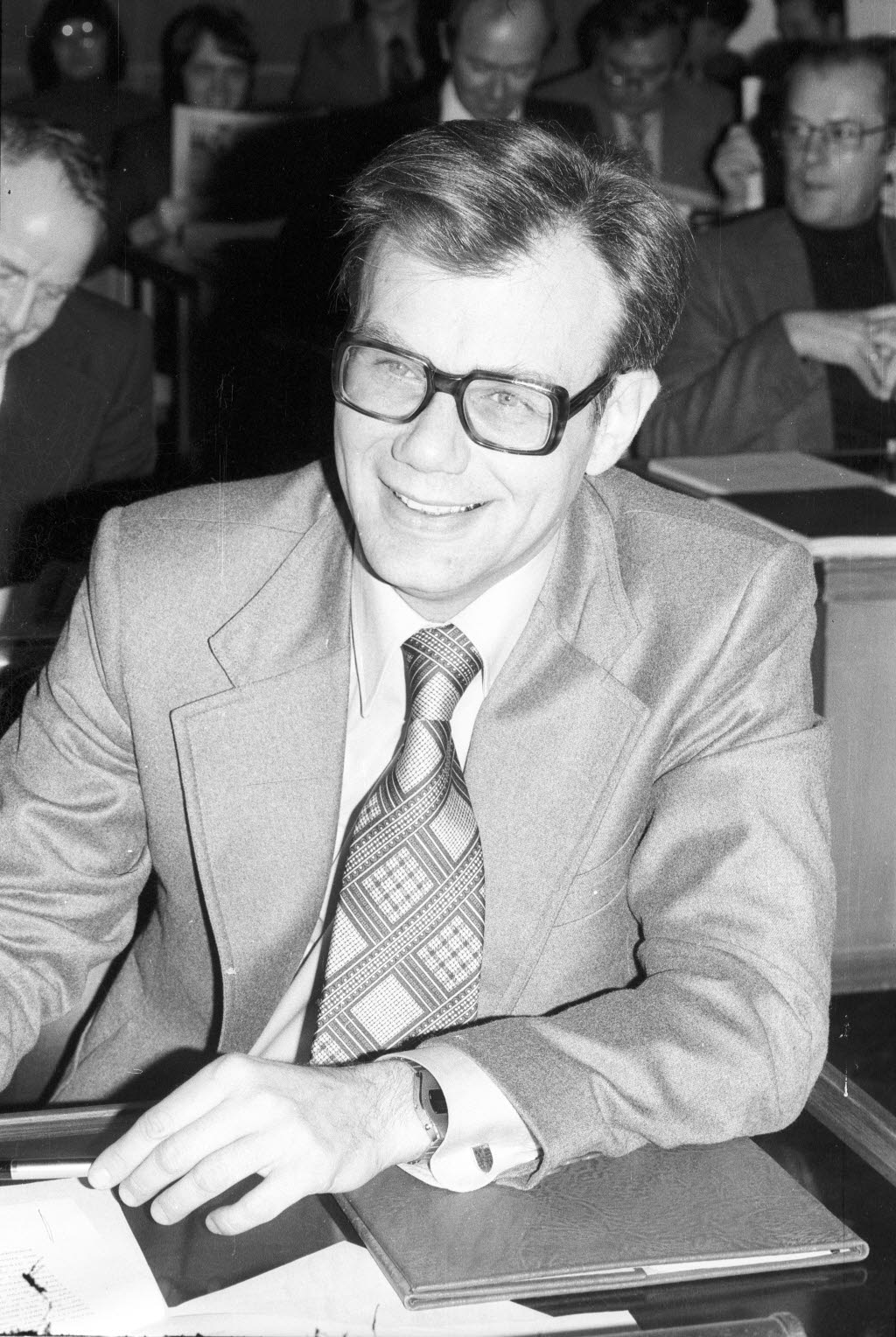 in der Ratsversammlung.